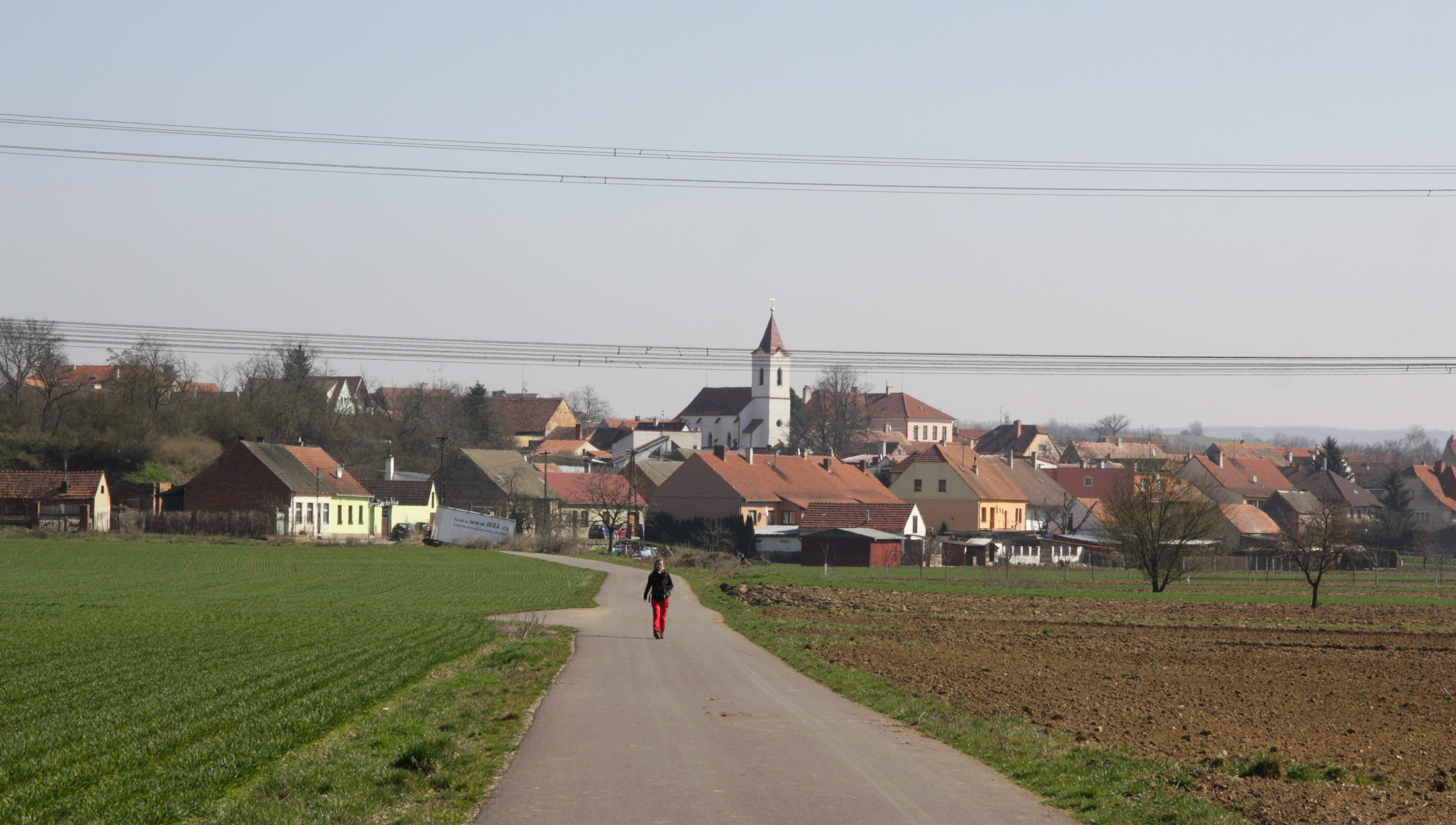 Rybníky (okres Znojmo) - pohled od západu, od stezky kolem Rokytné směr Vémyslice.